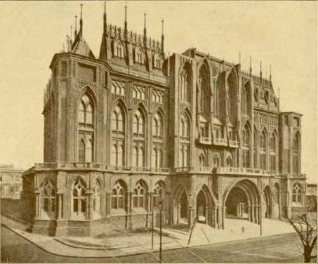 Vista del edificio inconcluso de la Facultad de Derecho y Ciencias Sociales de la Universidad de Buenos Aires. Proyectado por Arturo Prins en estilo neogótico, se comenzó en 1912 y la construcción se suspendió en 1925. Actualmente es sede de la Facultad de Ingeniería. Avenida Las Heras 2214, Buenos Aires, Argentina.